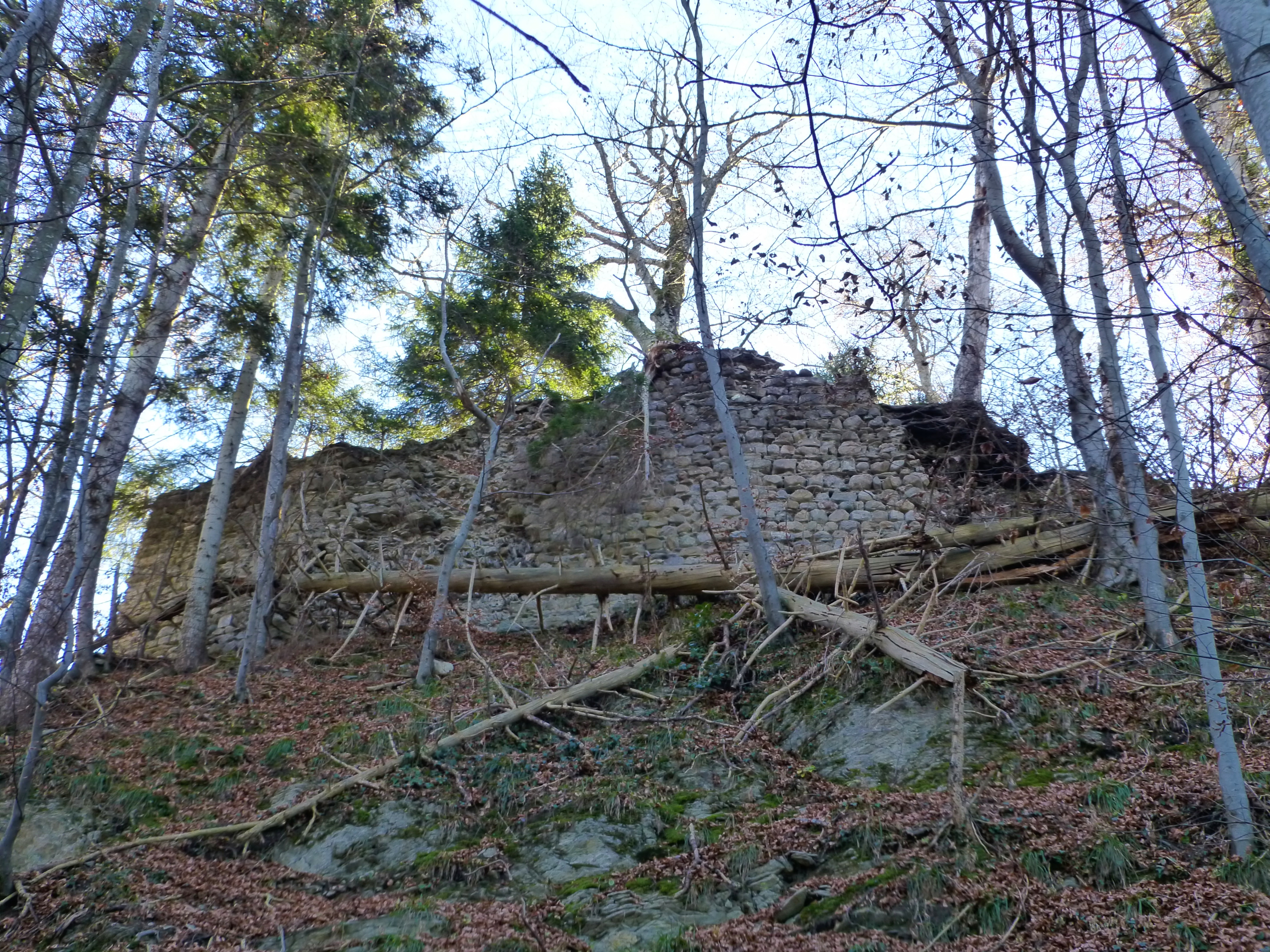 ein Teil der Burgruine Alt-Montfort zwischen den österreichischen Gemeinden Weiler und Fraxern